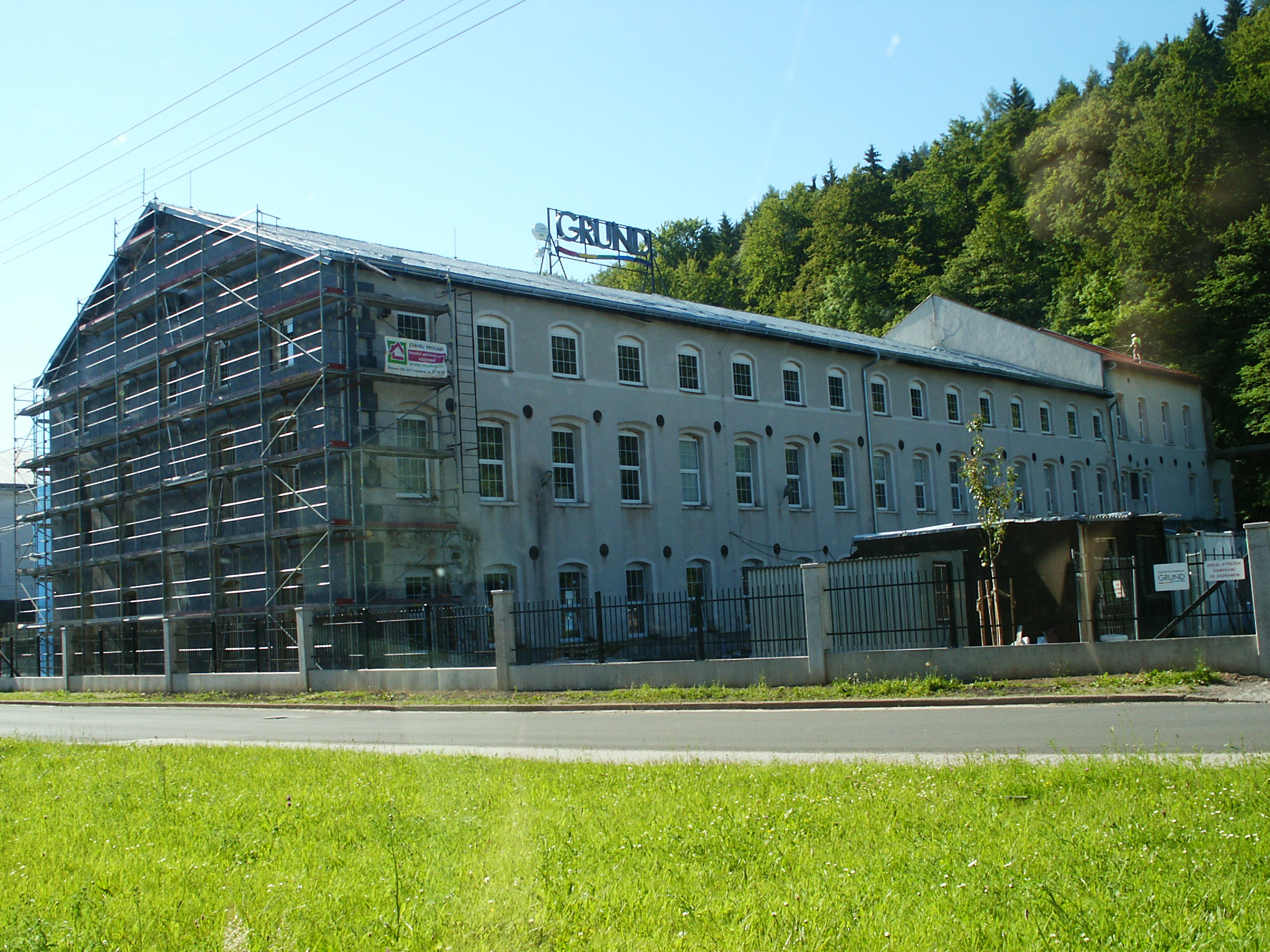 Kalná Voda - textilní továrna Grund (č.p. 5)